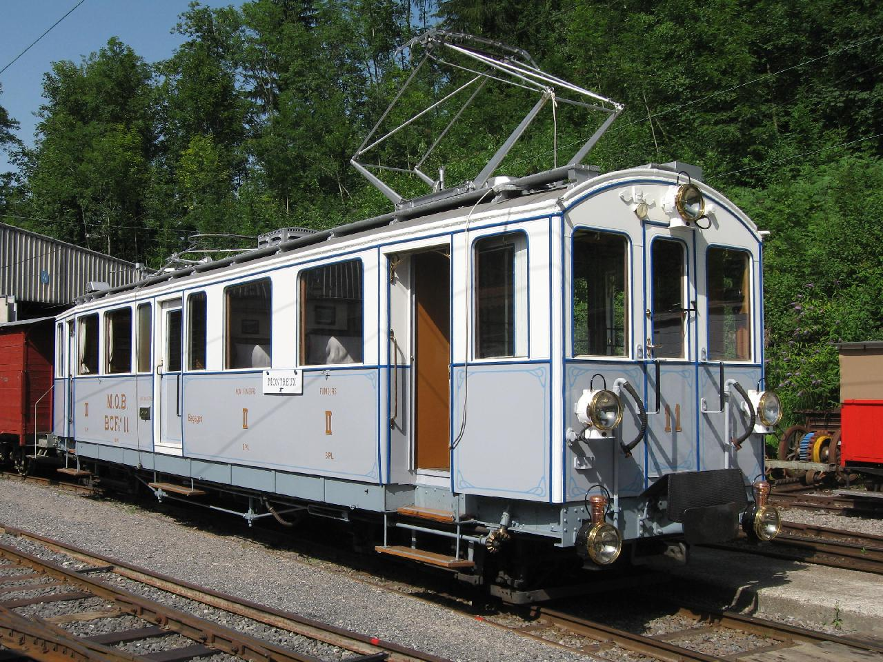 Elektrischer Triebwagen BCFe 4/4 11, aus der Serie les sept à vingt (MOB BCFe 4/4 7-20) der Montreux–Berner Oberland-Bahn (MOB), auf dem Museumsareal Chamby-Musée (Chaulin) der Museumsbahn Blonay–Chamby (BC).